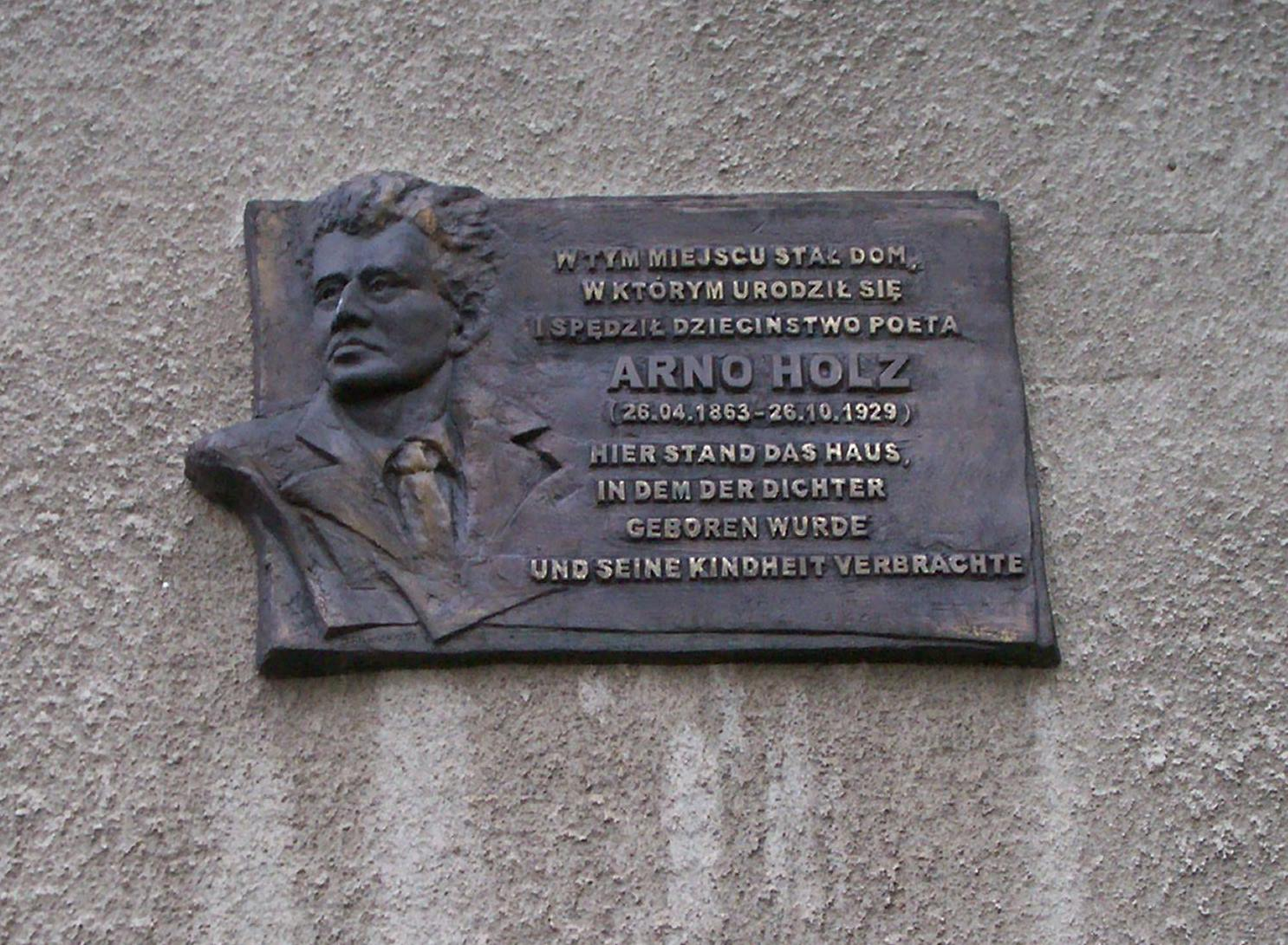 Tablica pamiątkowa upamiętniająca miejsce urodzenia poety Arno Holza, Kętrzyn, ul. Staromiejska